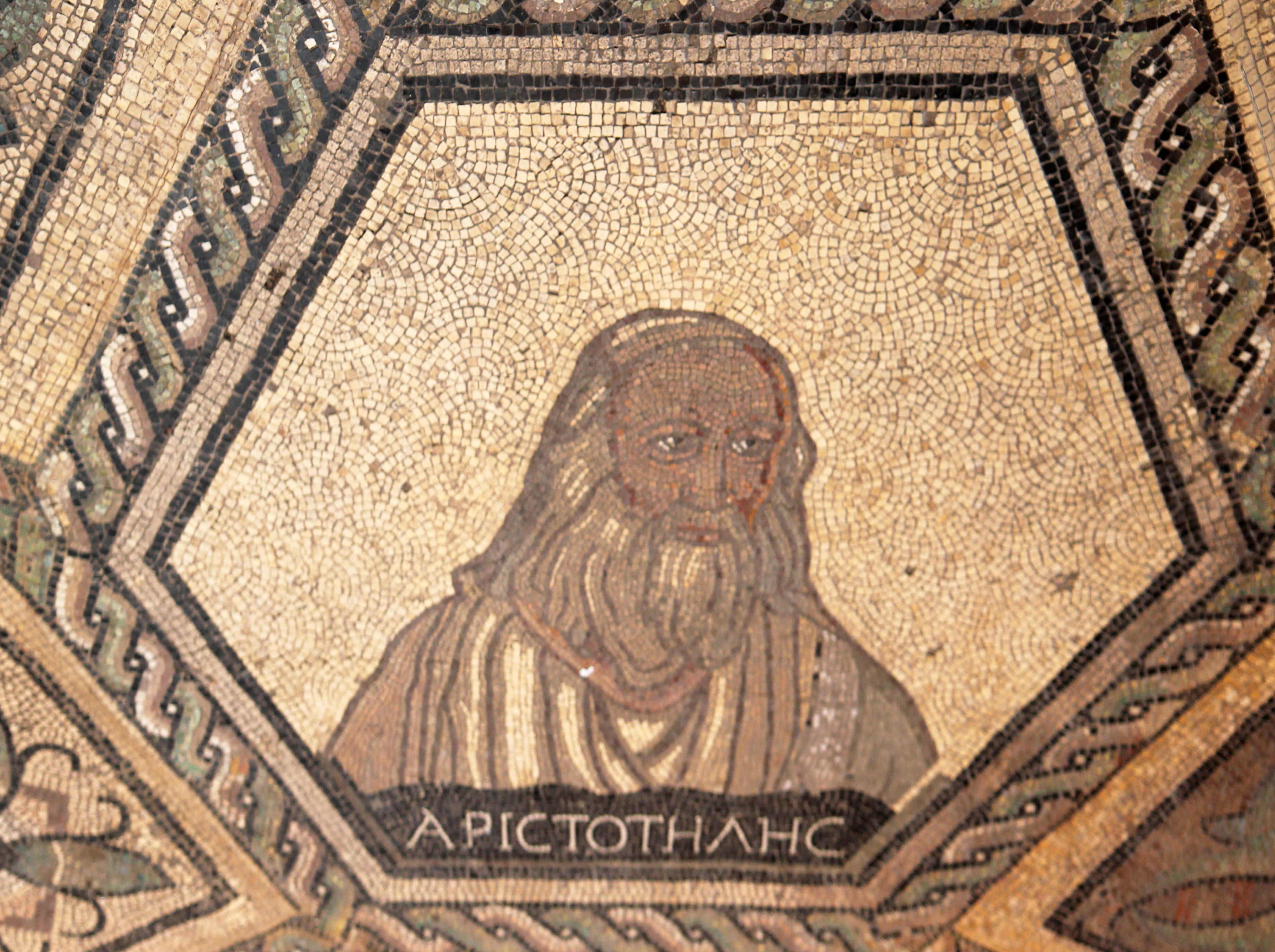 Porträt des Philosophenmosaiks. Das Mosaik wurde im Jahr 1844 unter einem Gartengrundstück des Bürgerhospitals aufgefunden. Ort der Ausstellung: Römisch Germanisches Museum in Köln.